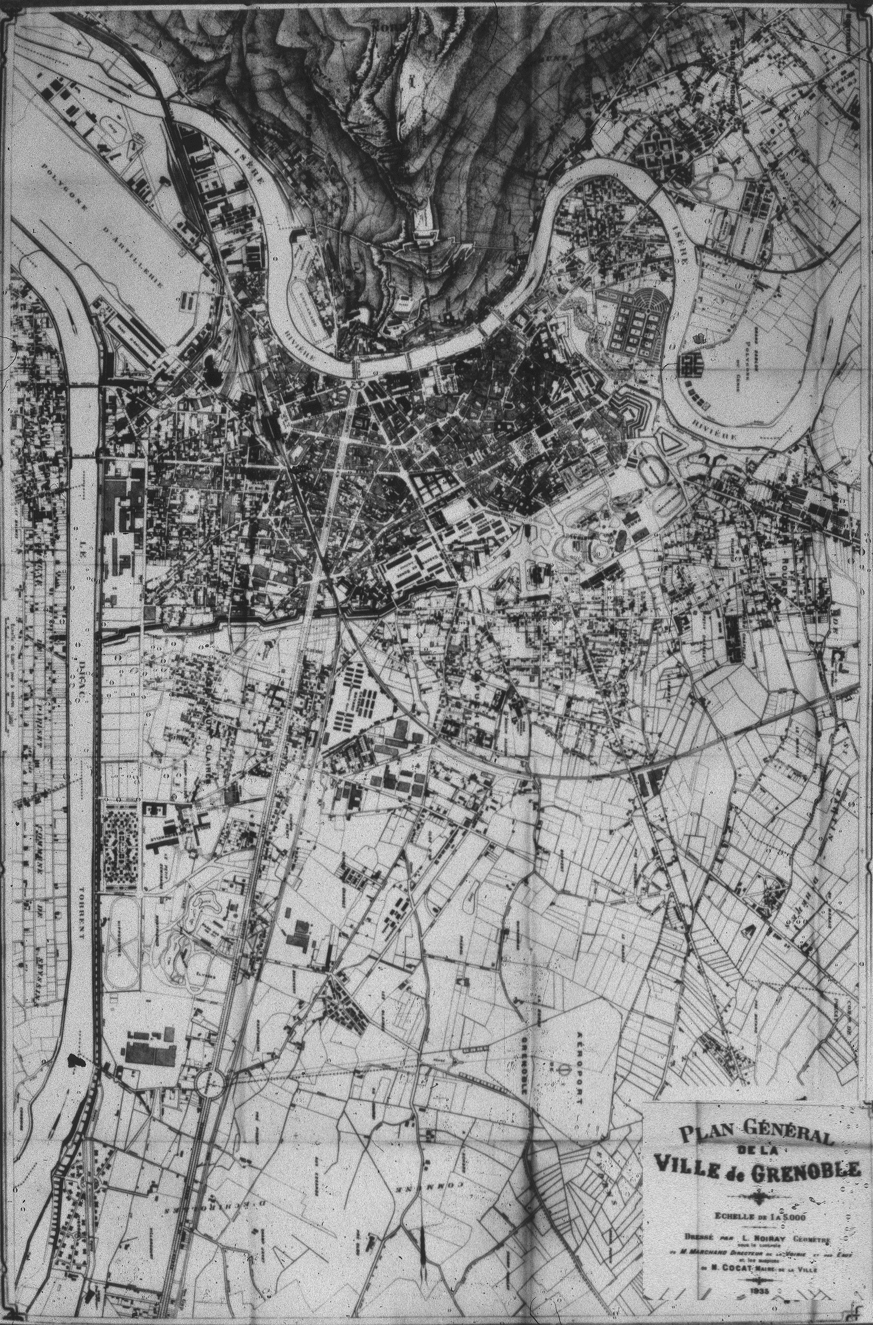 Grenoble en 1935. On voit l'aéroport au Sud, la cité de la Viscose (SO),le polygone d'artillerie (polygone scientifique actuel), le pont de la Tronche